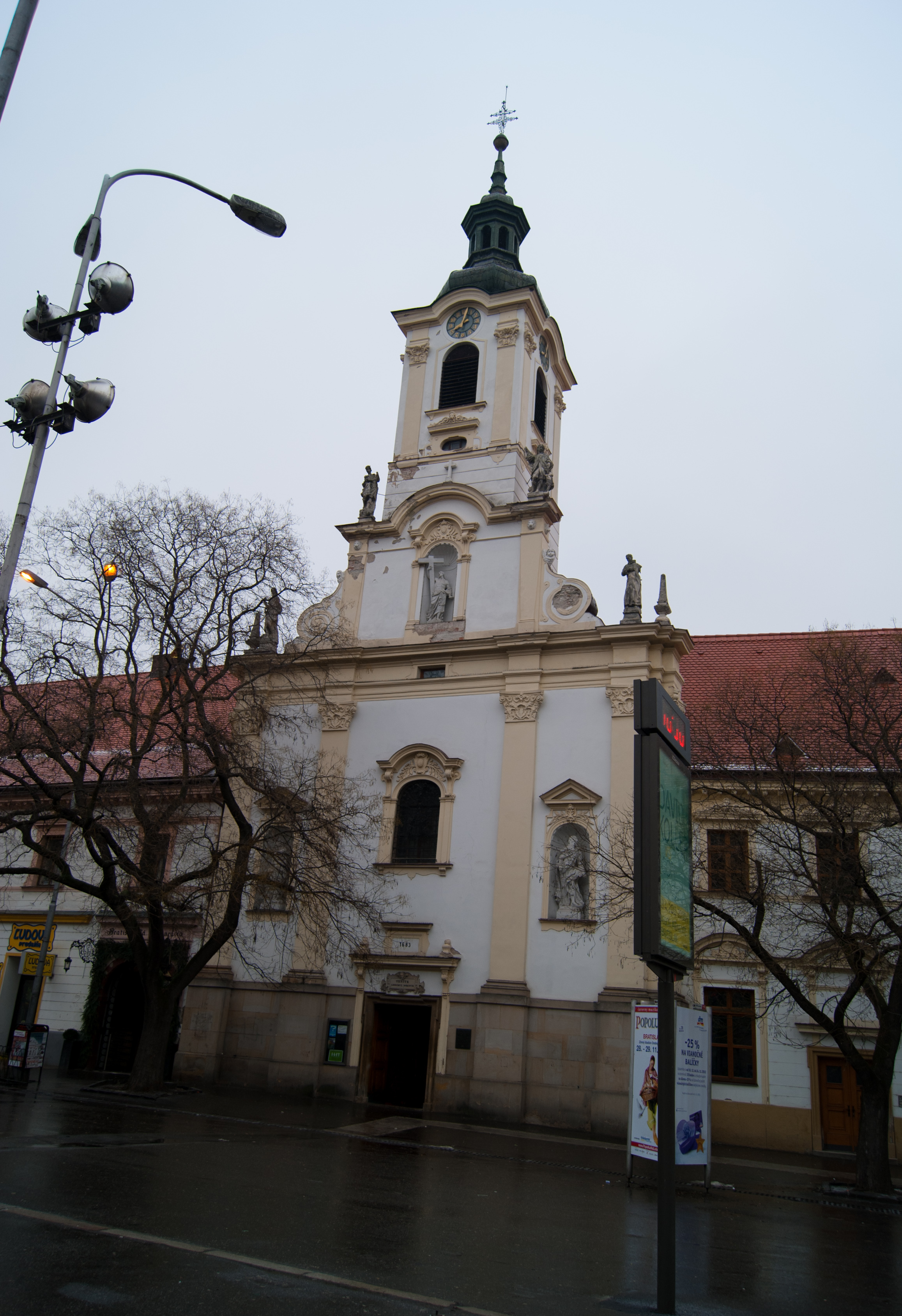 Kostol Navštívenia Panny Márie a kláštor Milosrdných bratov